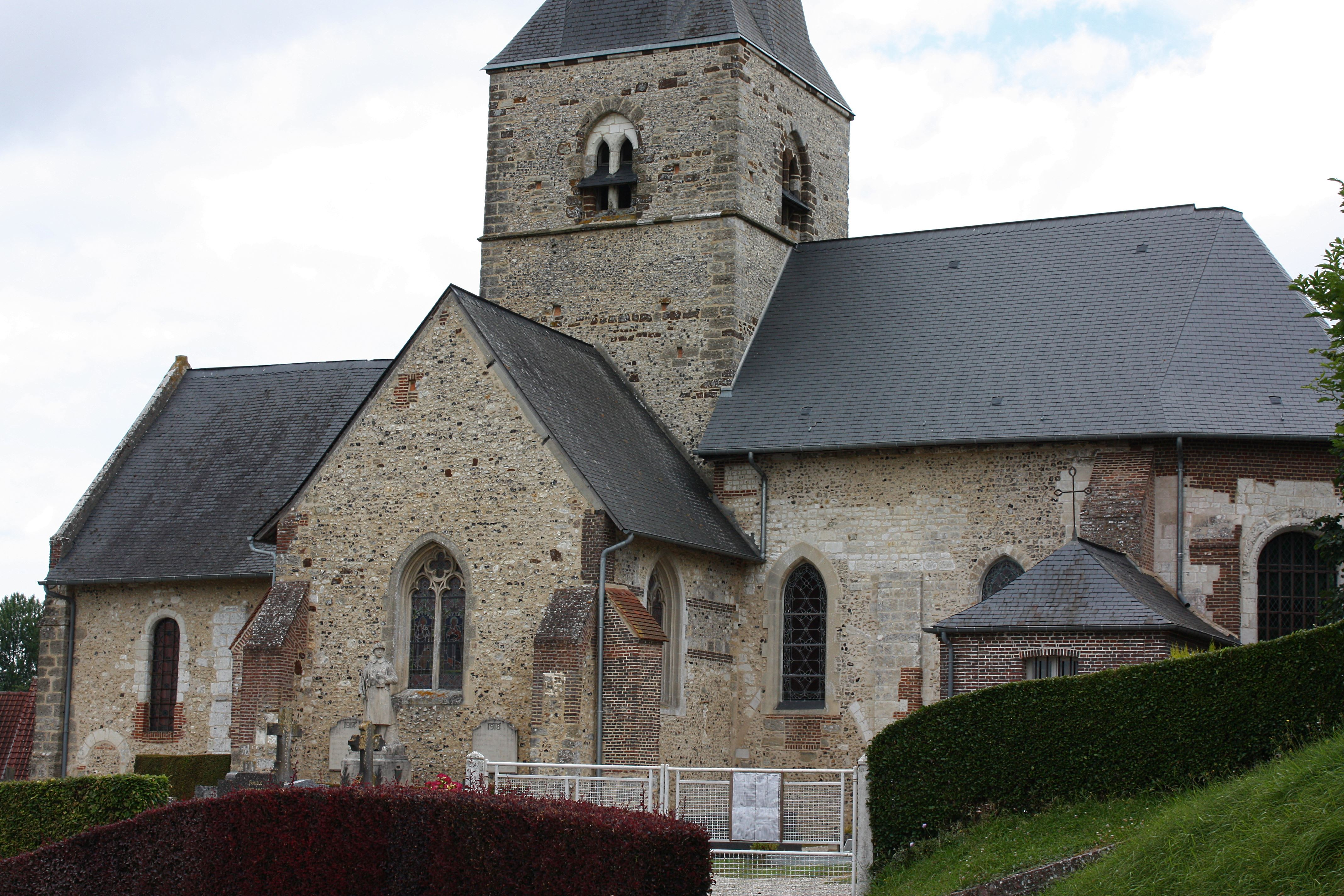 Vue générale de l'église au Sud